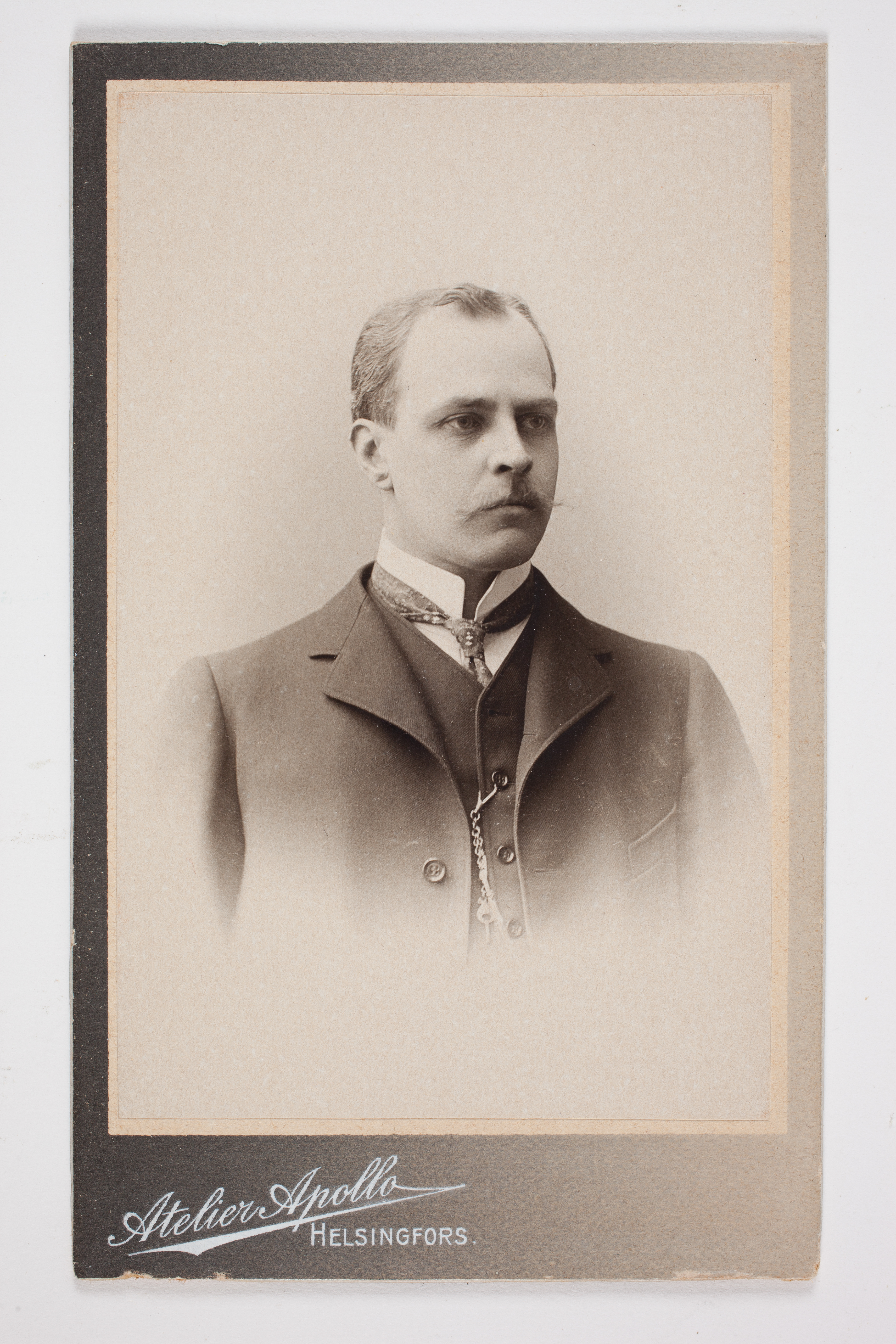 Ernst Estlander.